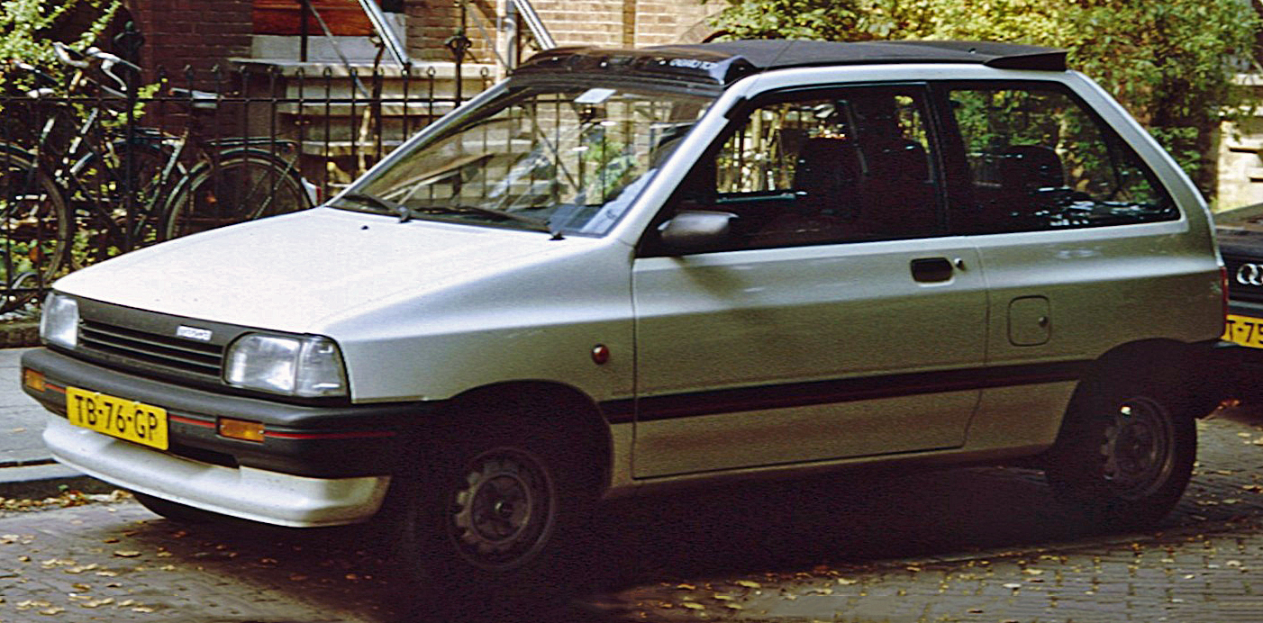 Mazda 121 Utrecht